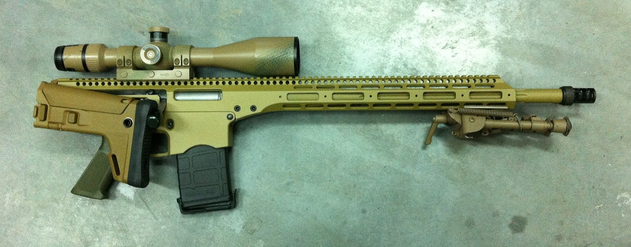 Z008 Gen II